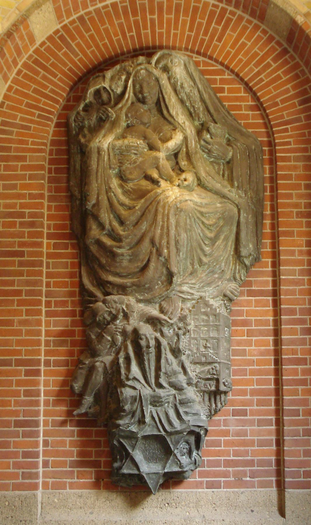 Rotterdam, stadshuis. Joods monument(2) van Loekie Metz. Rotterdam/The Netherlands.